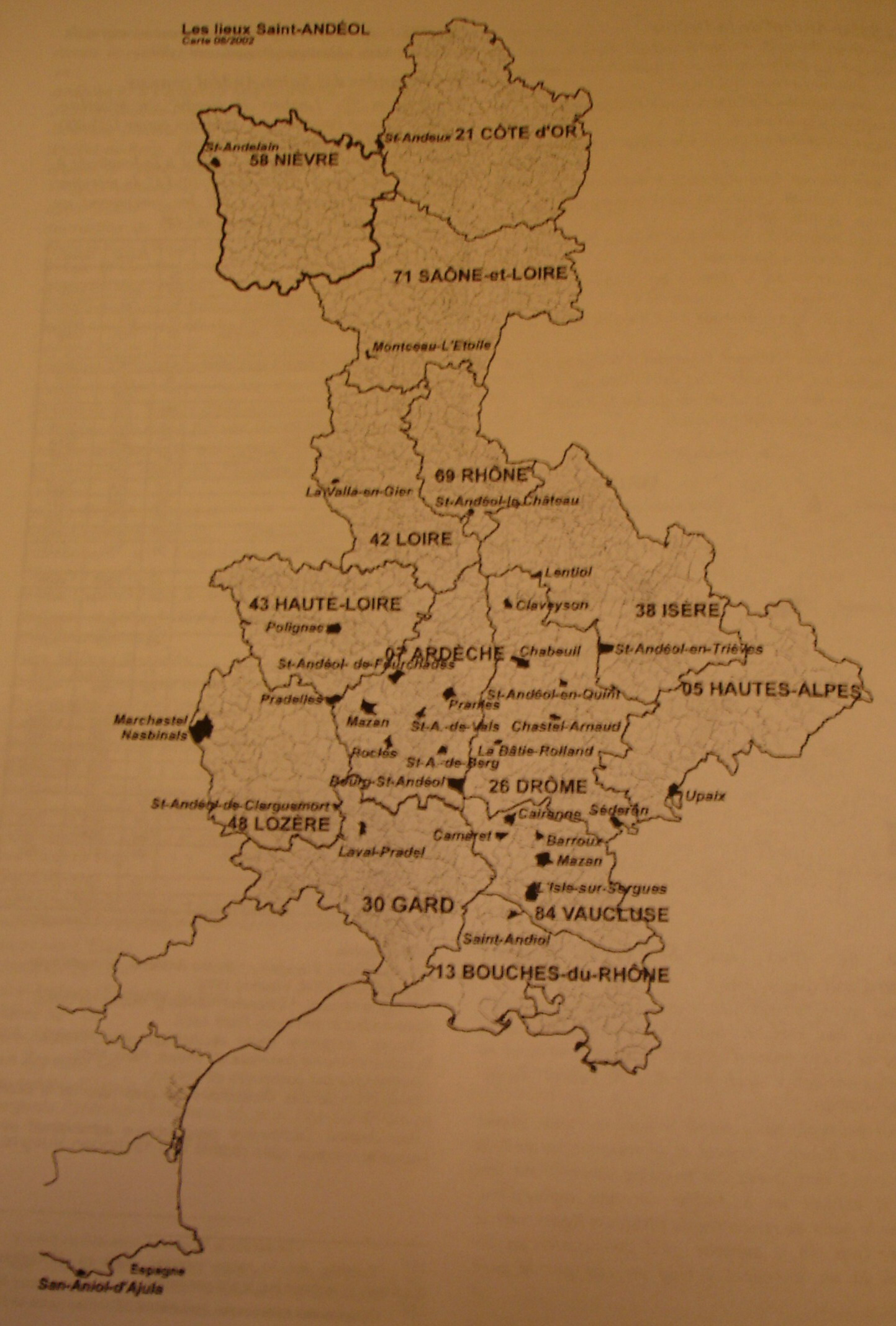 Carte des lieux appelés appelés st andéol